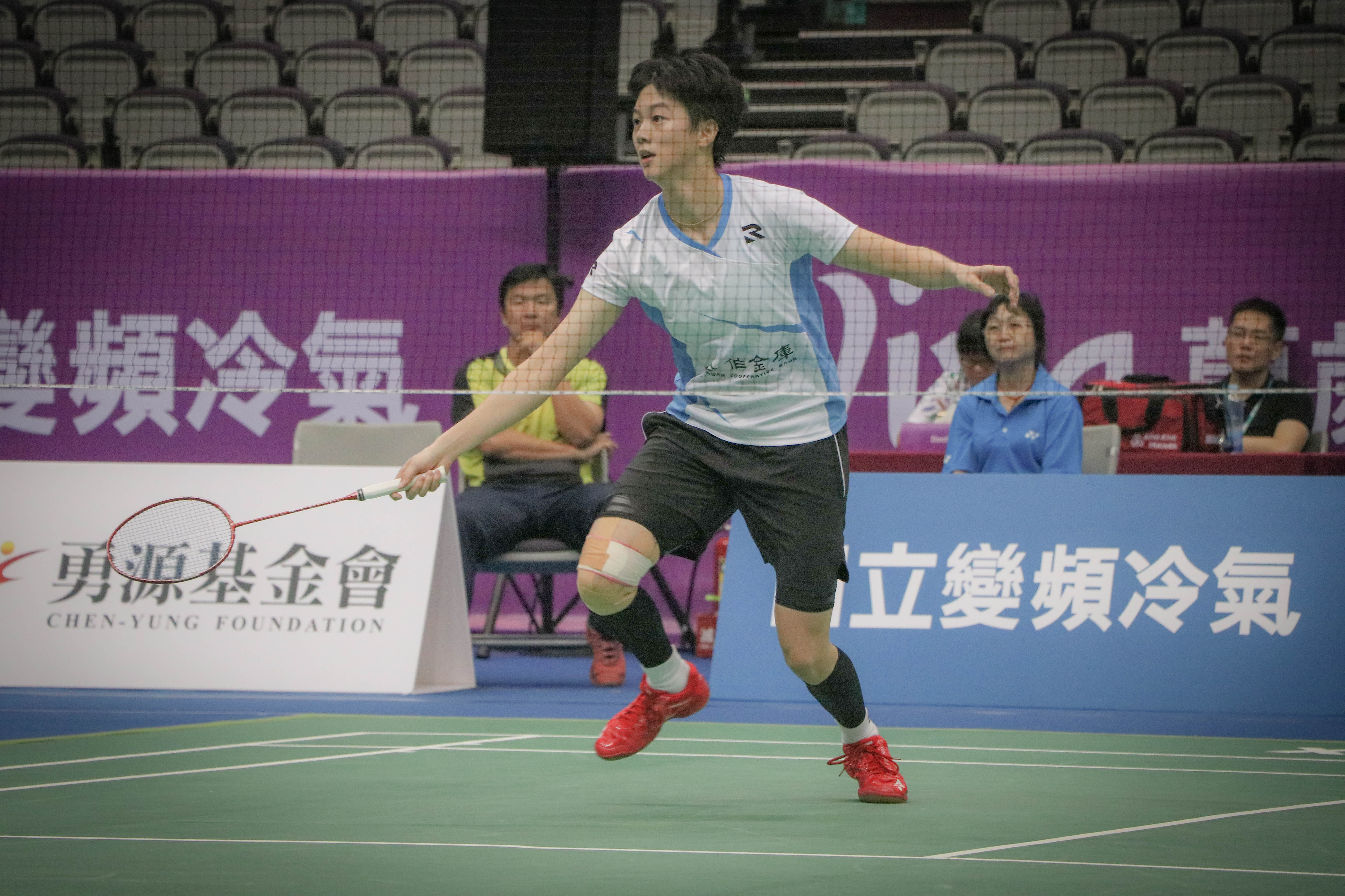 2018 台北OPEN 10/03